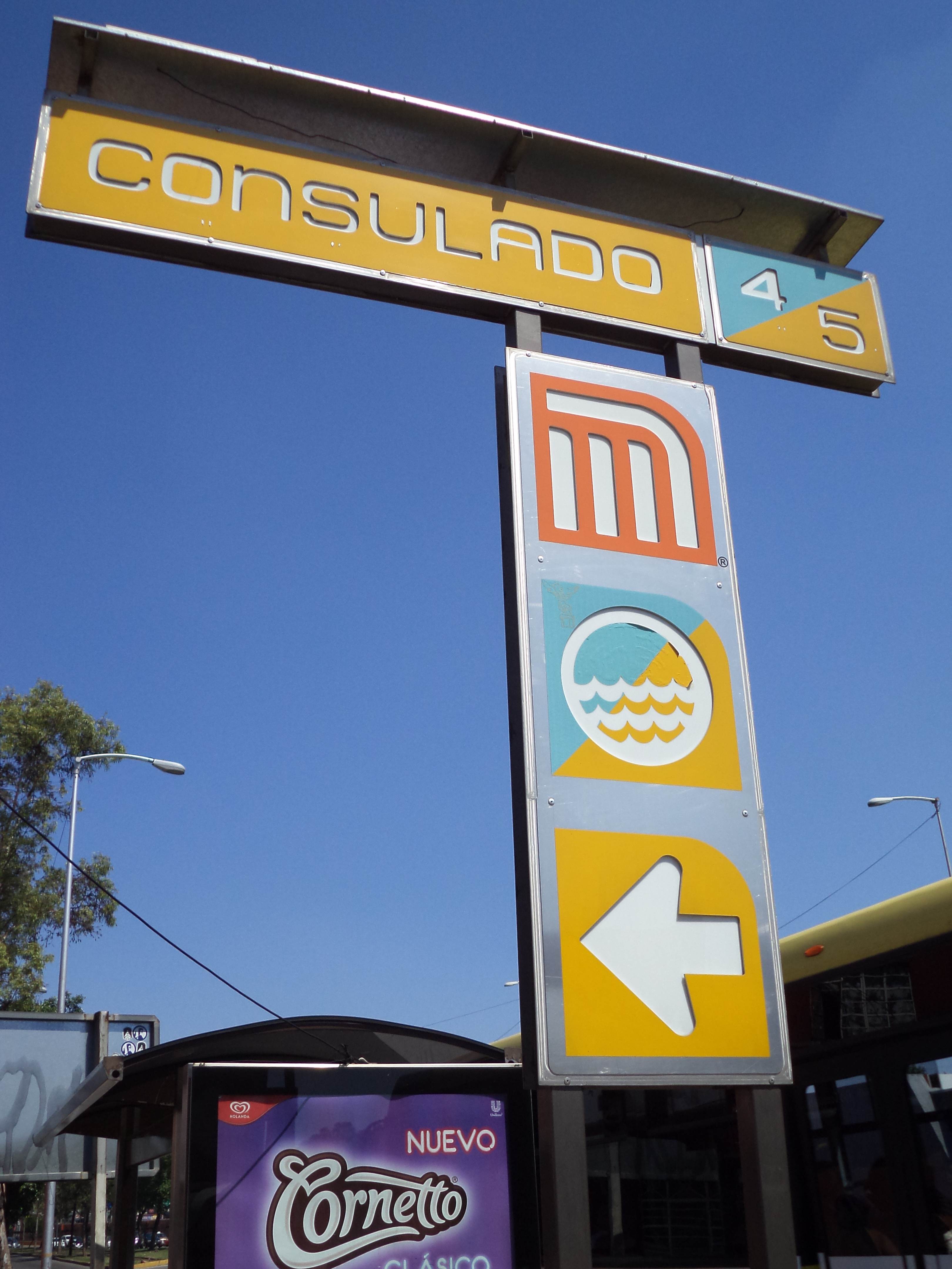 Estela estación Consulado